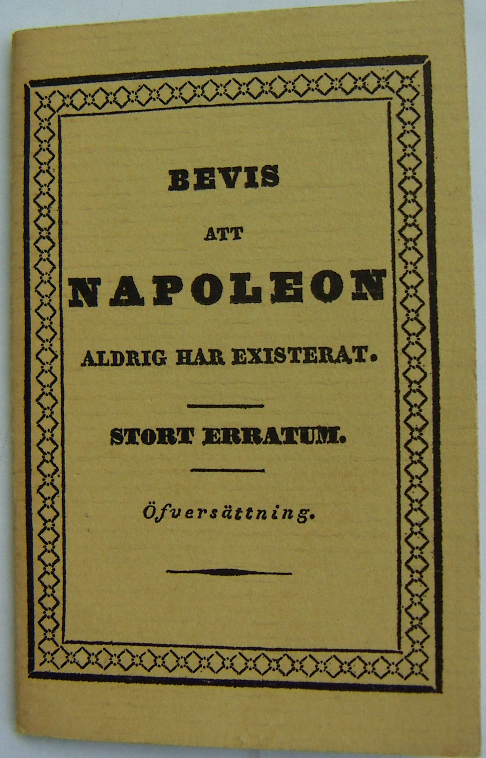 Boken på bilden är av fakismilupplagan från 1962. Bevis att Napoleon aldrig har existerat var den första bok som Albert Bonniers förslag gav ut.